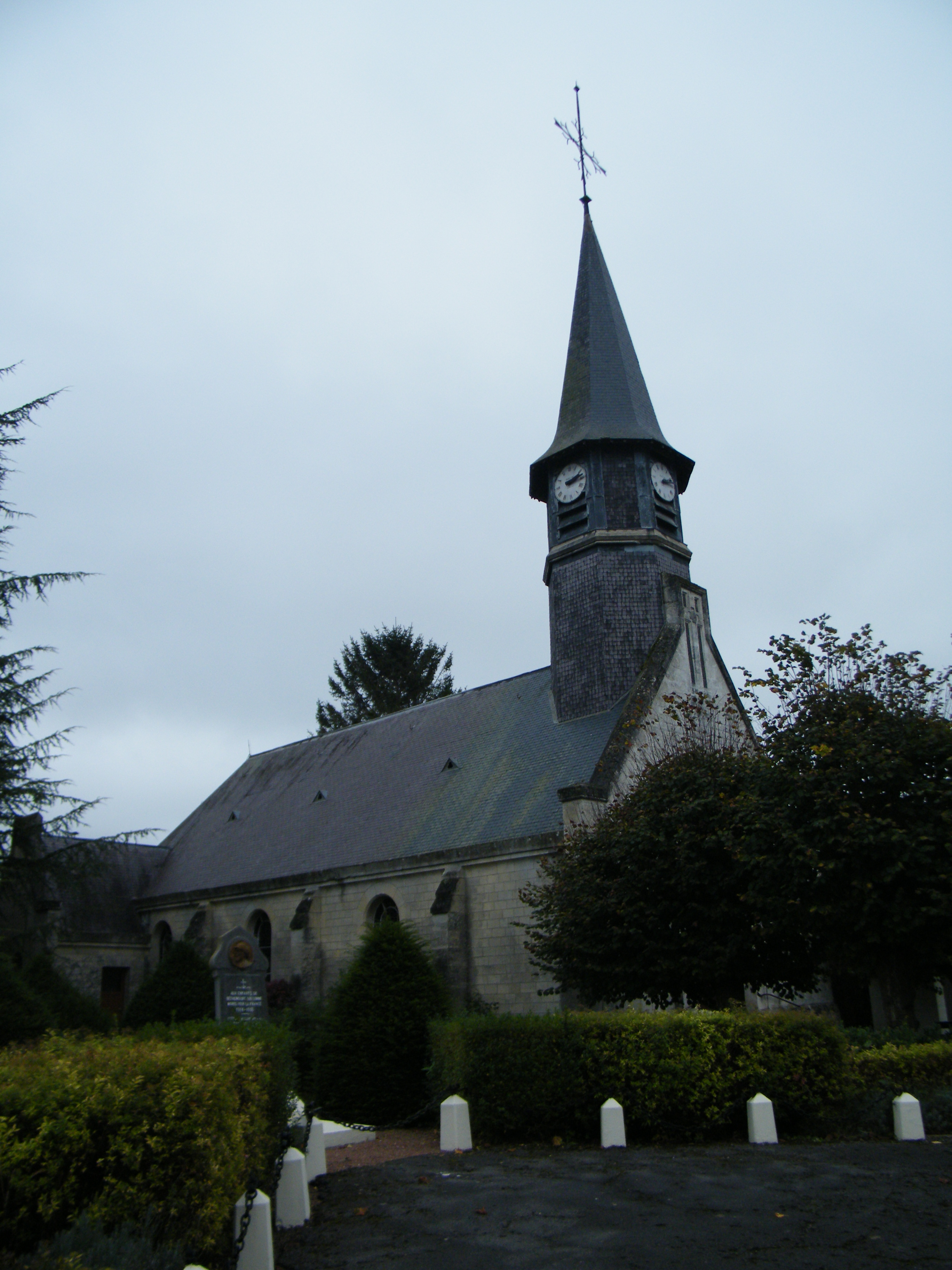 église.